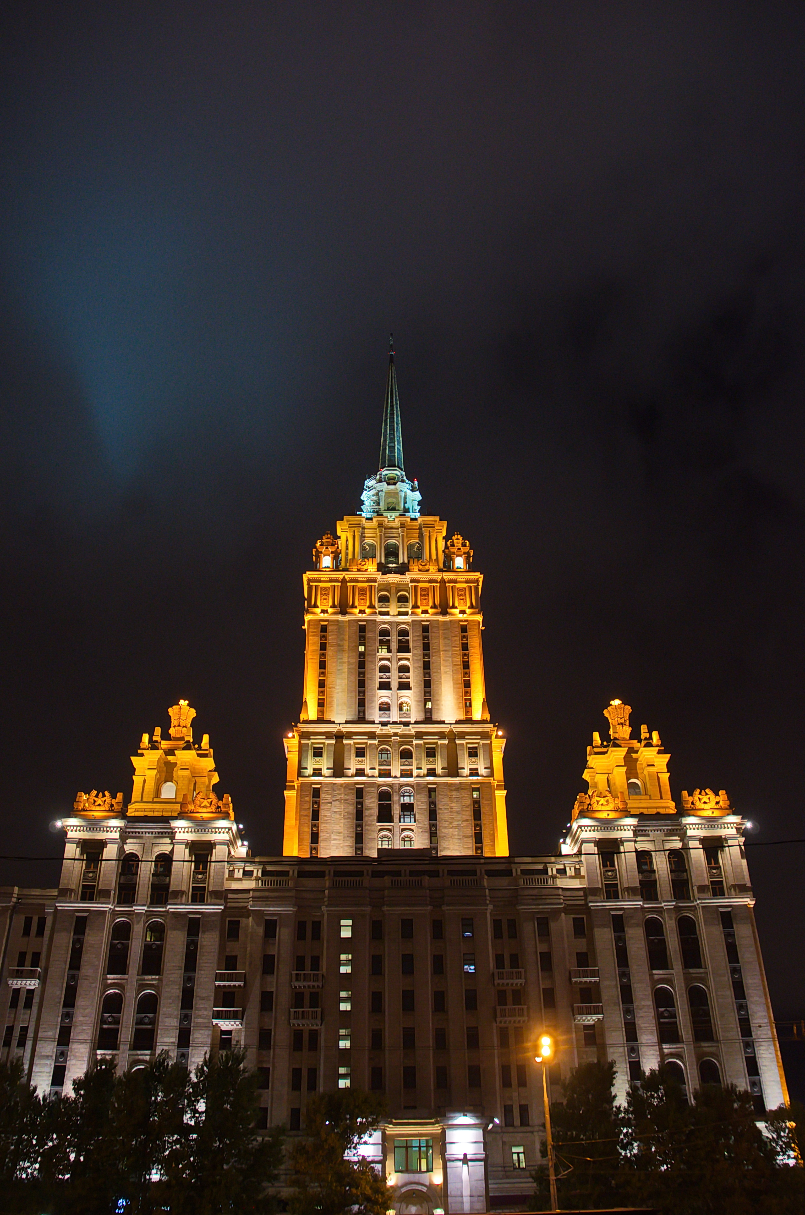 0878 - Moskau 2015 - Hotel Ukraine